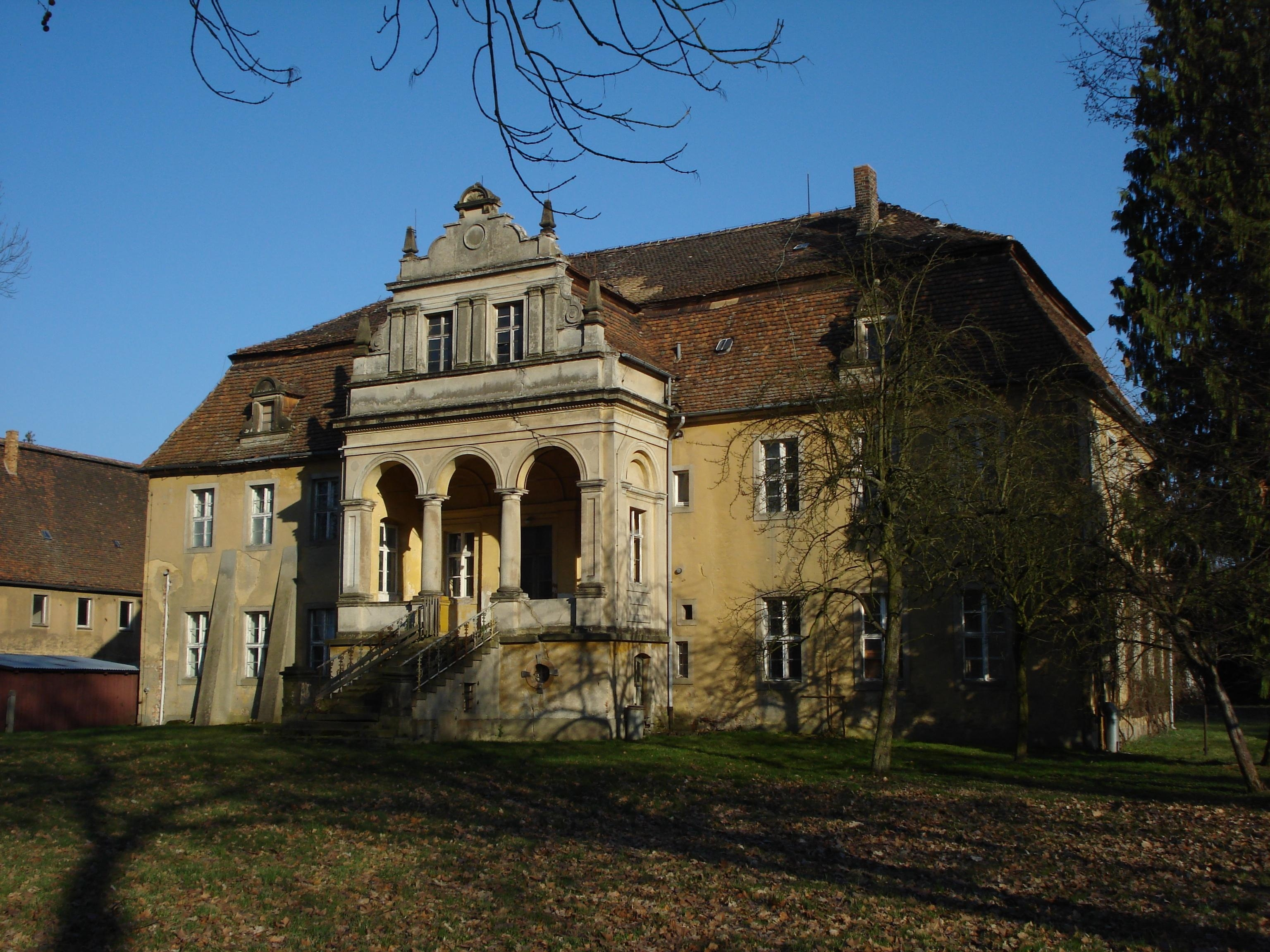 Parkseite von Schloss Daubitz im Jahr 2008